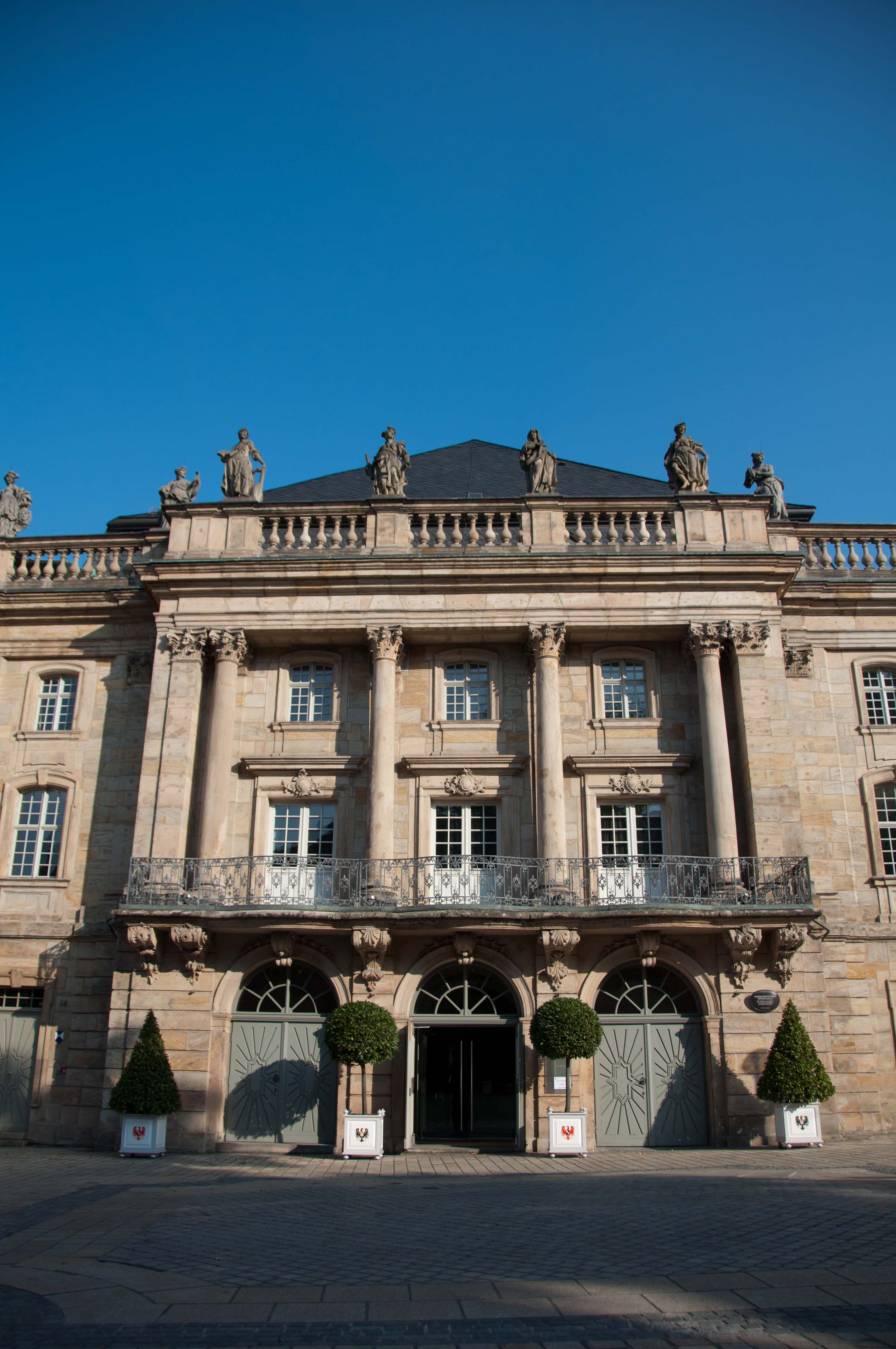 Markgräfliches Opernhaus